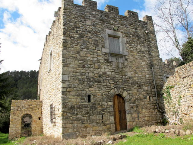 castell de Campdorà al Gironés - Catalunya